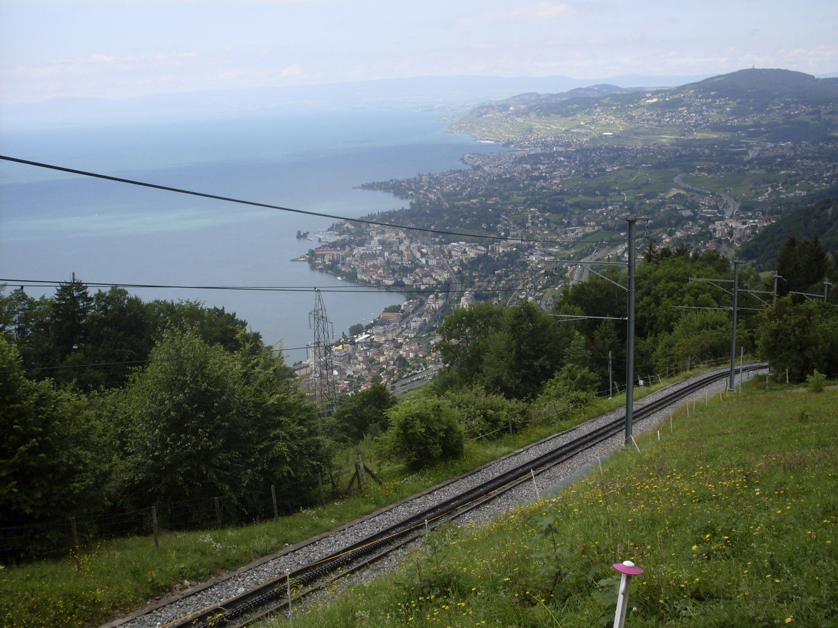 Zug zwischen Glion und Caux, Schweiz